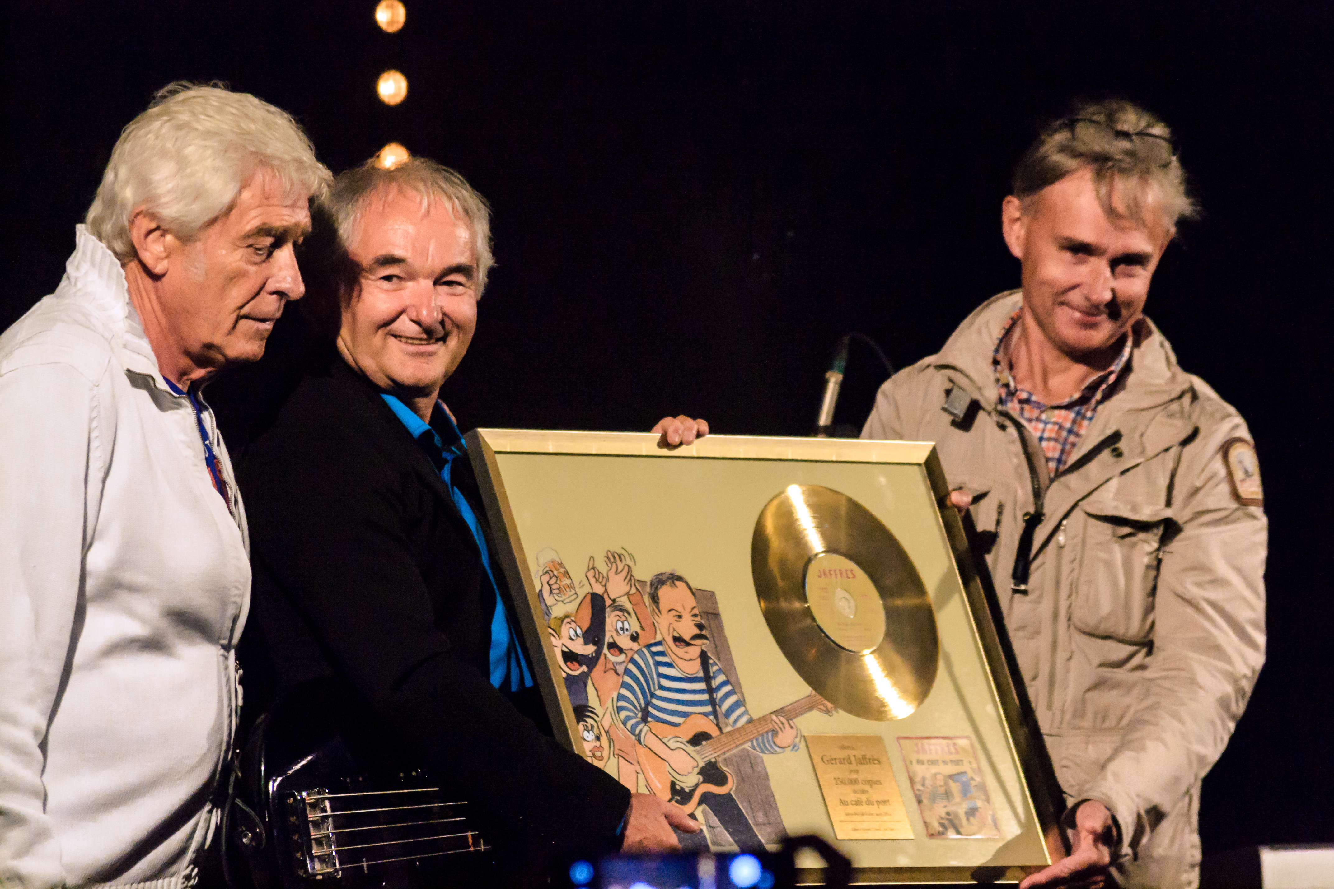 Remise du disque de platine à Gérard Jaffrès pour le single Au café du port par son producteur Jan Neef et le maire de Saint-Pol-de-Léon le 15 août 2016.